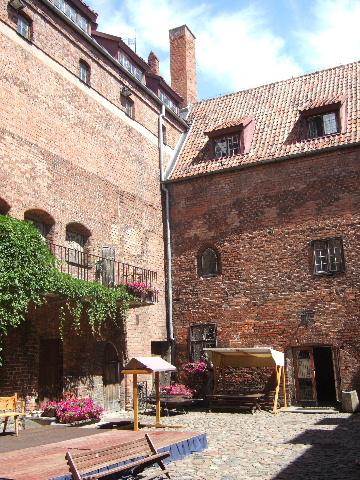 Dziedziniec zamku w Kętrzynie